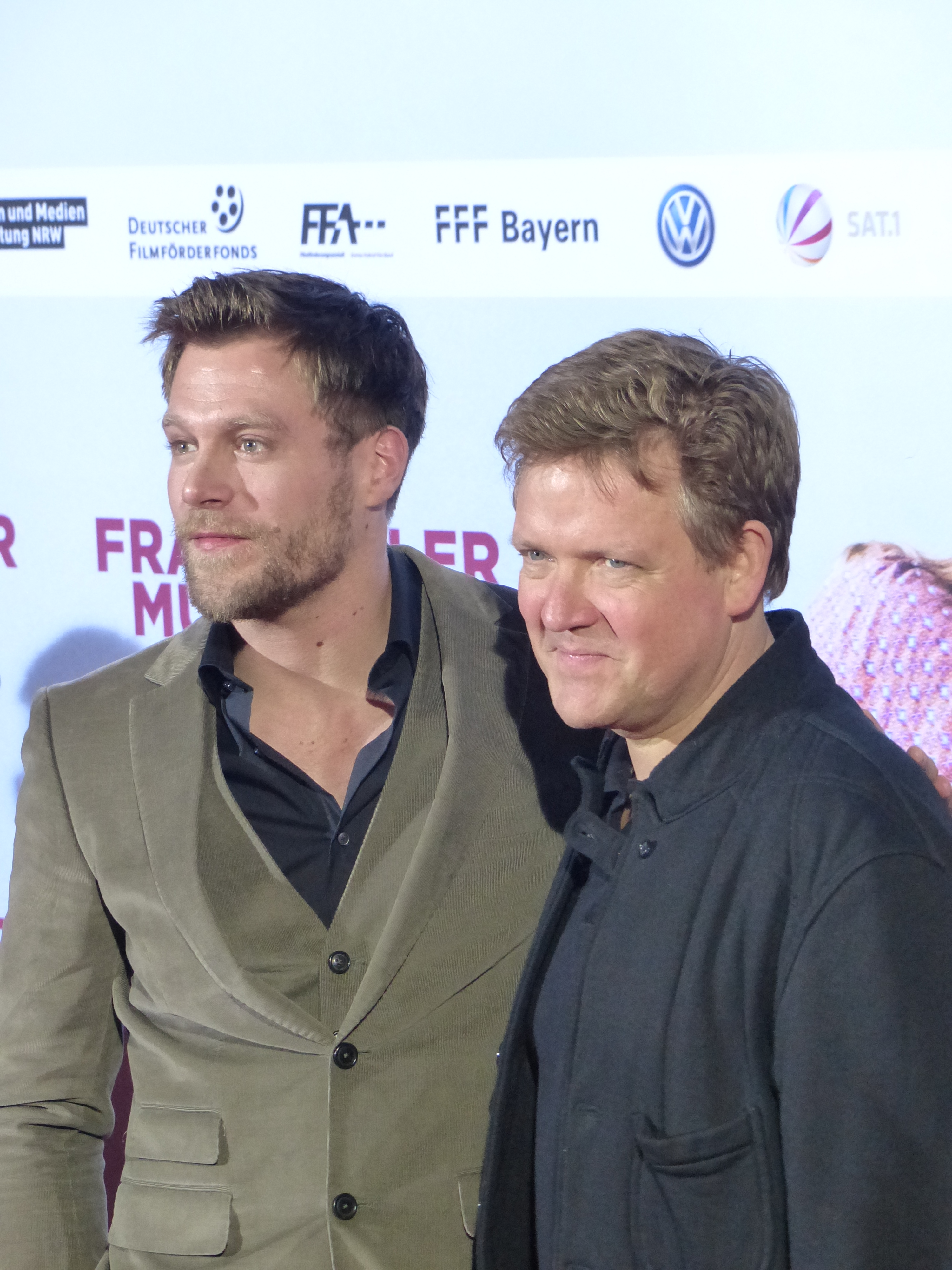 Ken Duken und Justus von Dohnányi bei der Kinopremiere von "Frau Müller muss weg", Januar 2015, Cinedom Köln